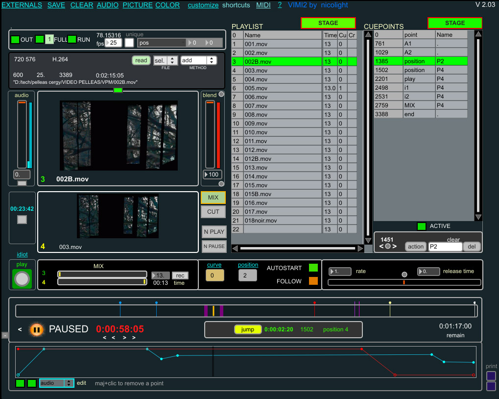 interface de Vimi2